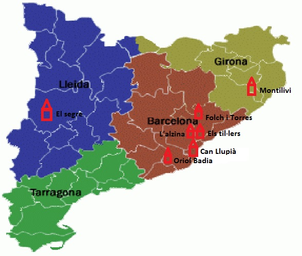 Mapa amb la situació gfeogràfica dels diferents centres de menors a Catalunya